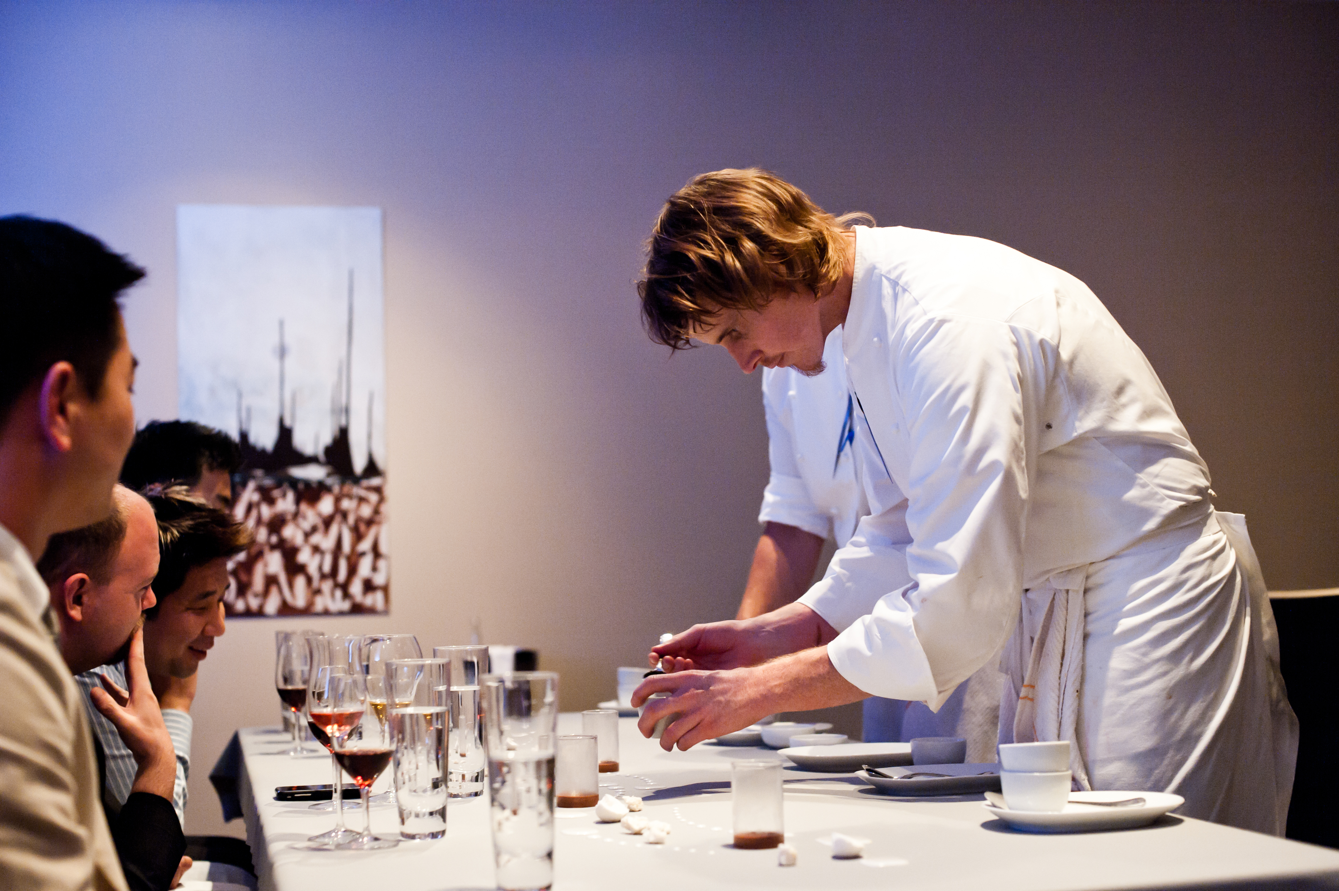 JOH_1267